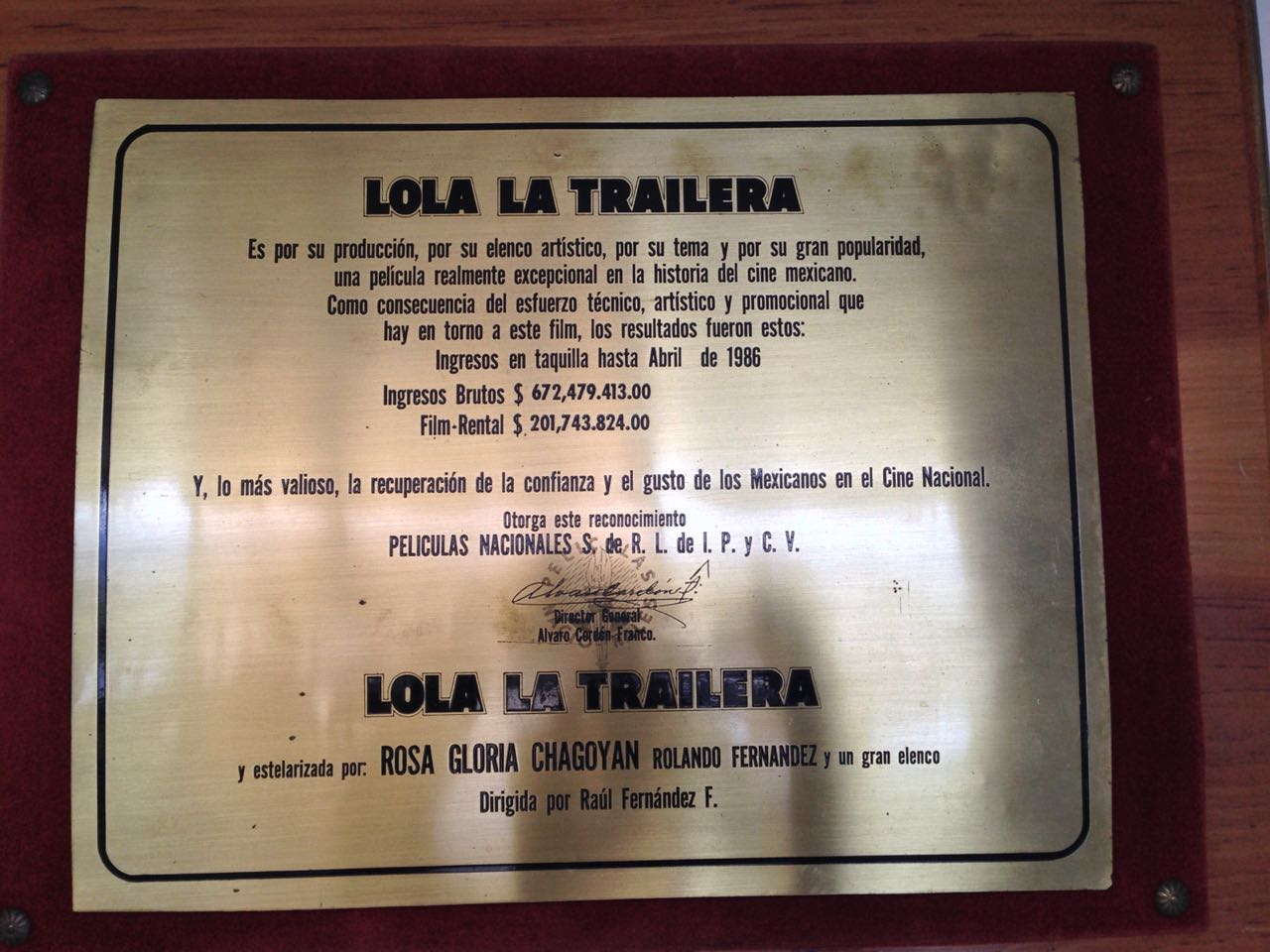 Reconocimiento el estreno de la película LoLa La Trailera